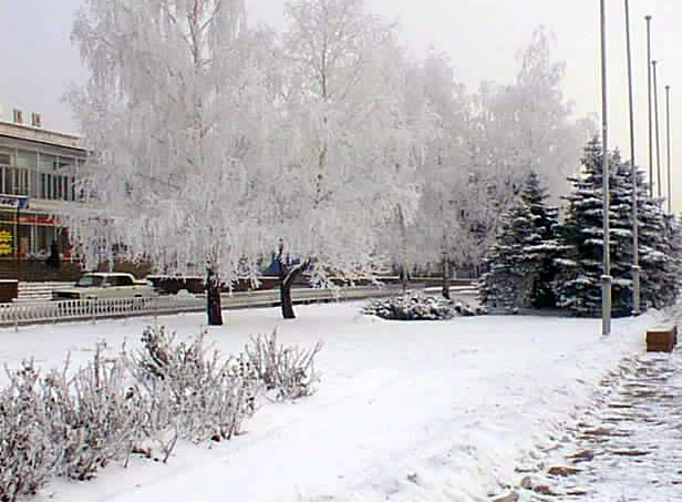 Yenakievo_sq_lenin Енакиево - площадь у городского совета